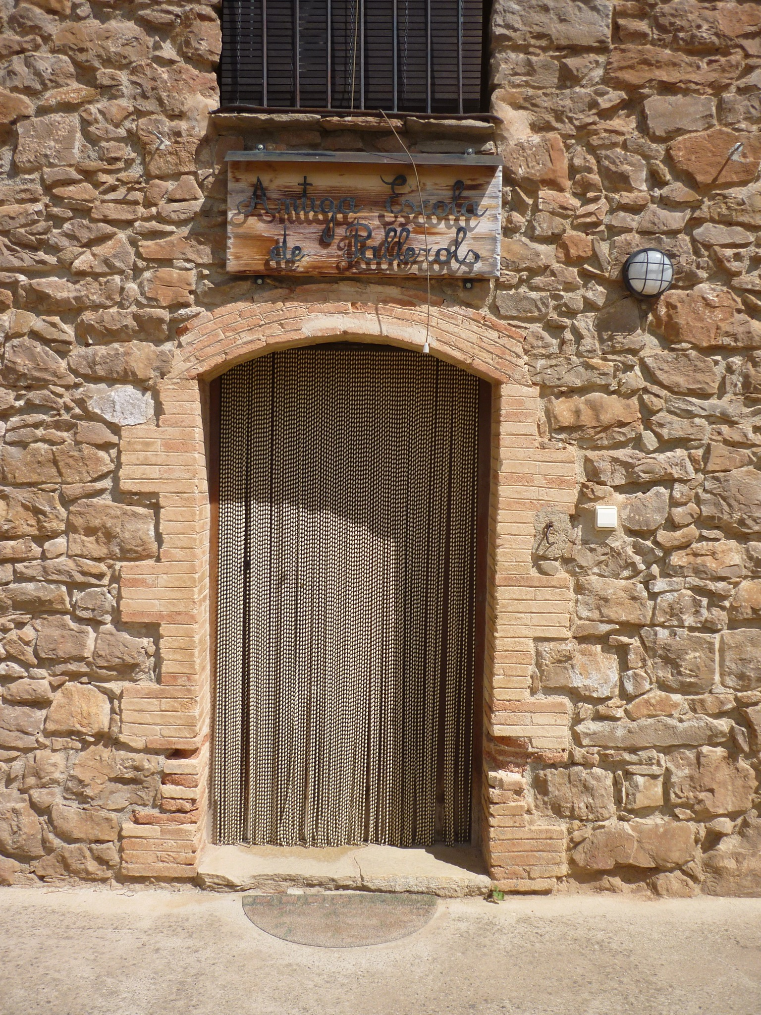 Escola Pública de Pallerols: portal (la Baronia de Rialb)